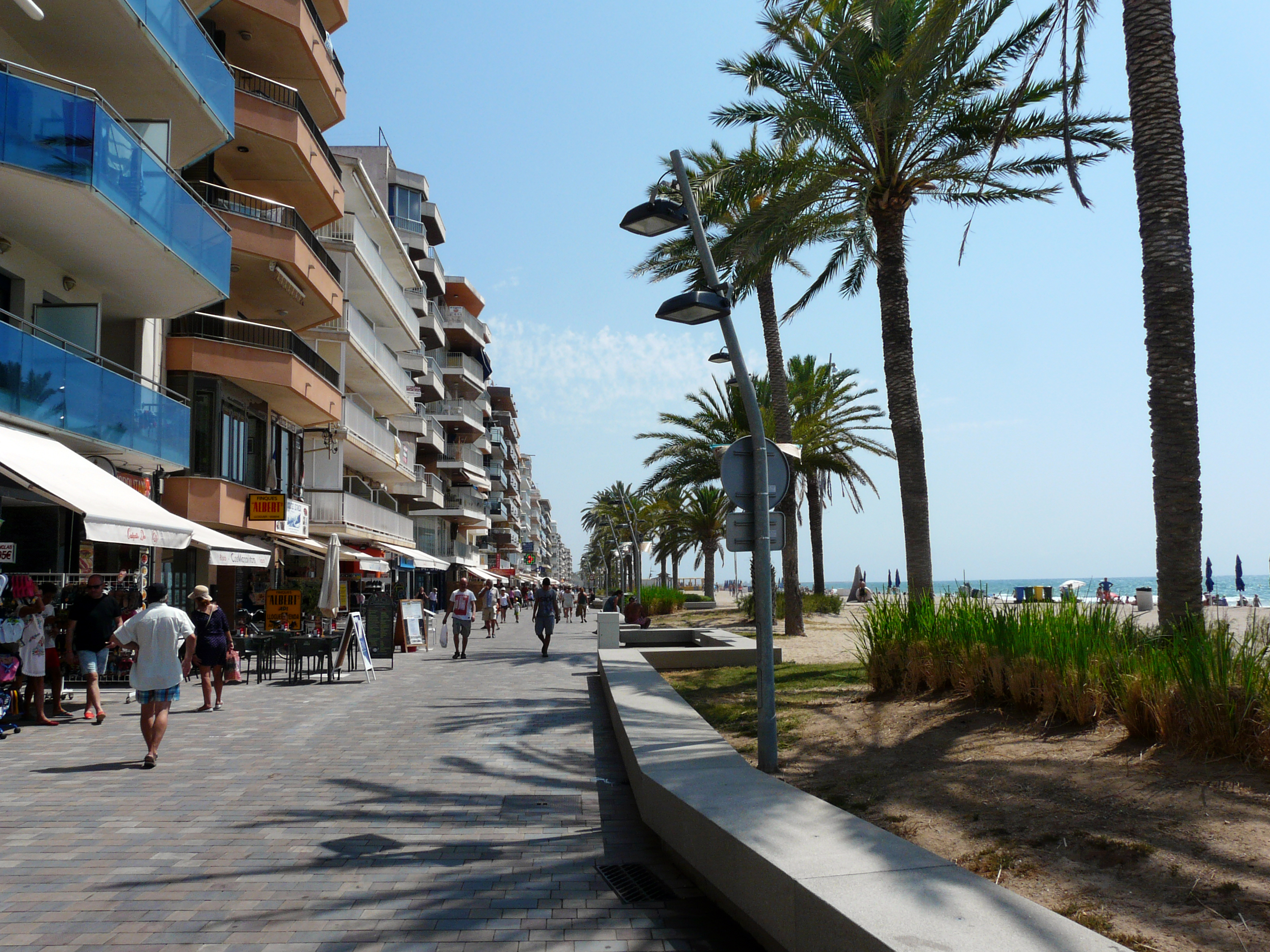 Променад вдоль пляжа